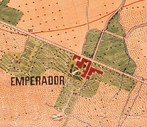 Emperador el 1883 (el nord està a la dreta).